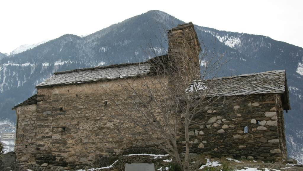 Església de Sant Romà de les Bons